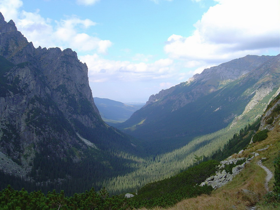 Bielovodska dolina